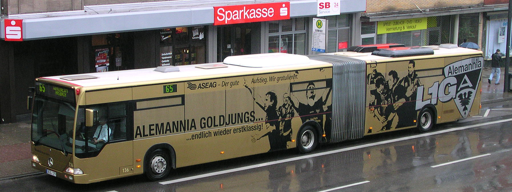 Gelenkbus zur Feier des Aufstiegs von Alemannia Aachen in die Fußball-Bundesliga an der Bushaltestelle "Schönforst" Richtung Brand